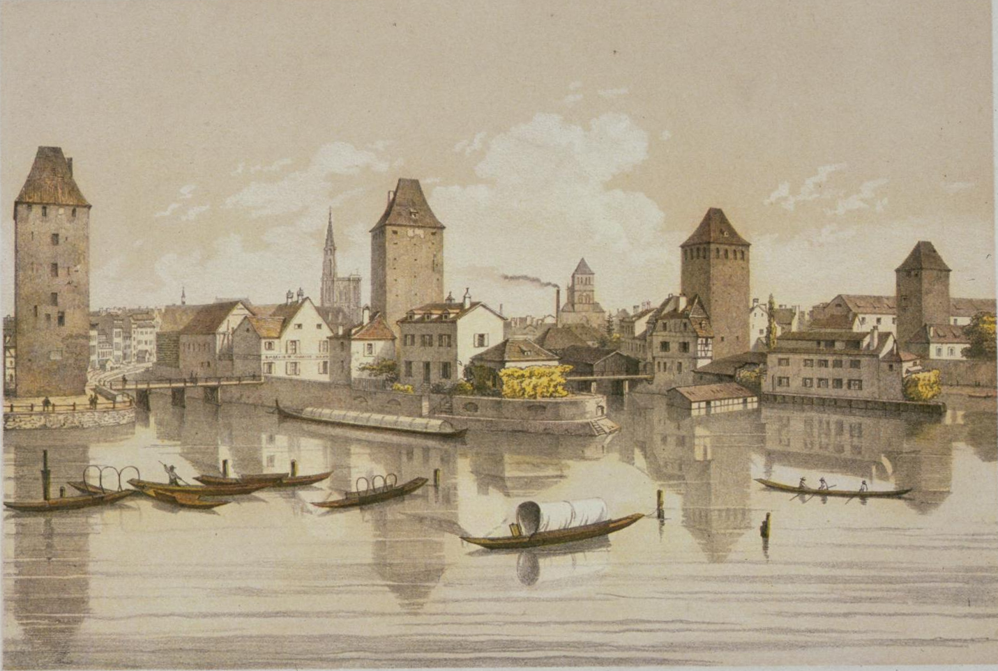 Strasbourg. Vue prise du Pont couvert